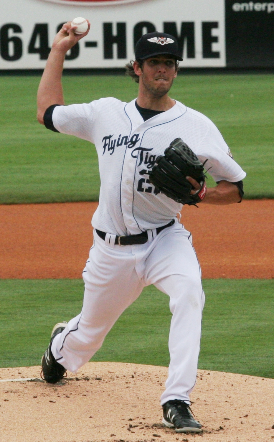 Drew VerHagen